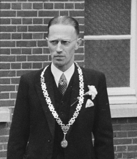 Collectie / Archief : Fotocollectie Anefo Reportage / Serie : [ onbekend ] Beschrijving : Koningin Juliana bezoekt Limburg. R.K. Landbouwhuishoudschool in Posterholt. Annotatie : Vooraan Commissaris der Koningin in Limburg F. Houben Datum : 18 september 1952 Locatie : Limburg, Posterholt Trefwoorden : koninklijke bezoeken, koren, nonnen Persoonsnaam : Juliana (koningin Nederland) Fotograaf : Noske, J.D. / Anefo Auteursrechthebbende : Nationaal Archief Materiaalsoort : Negatief (zwart/wit) Nummer archiefinventaris : bekijk toegang 2.24.01.03 Bestanddeelnummer : 905-3131